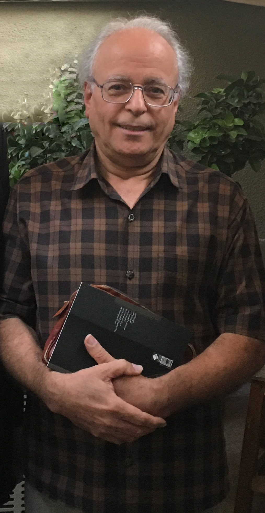 شریف لطفی در مراسم رونمایی از آلبوم ديورتيمنتو اثر احمد پژمان ۳۱ تیر ۱۳۹۵ موسسه خانه هنر خرد